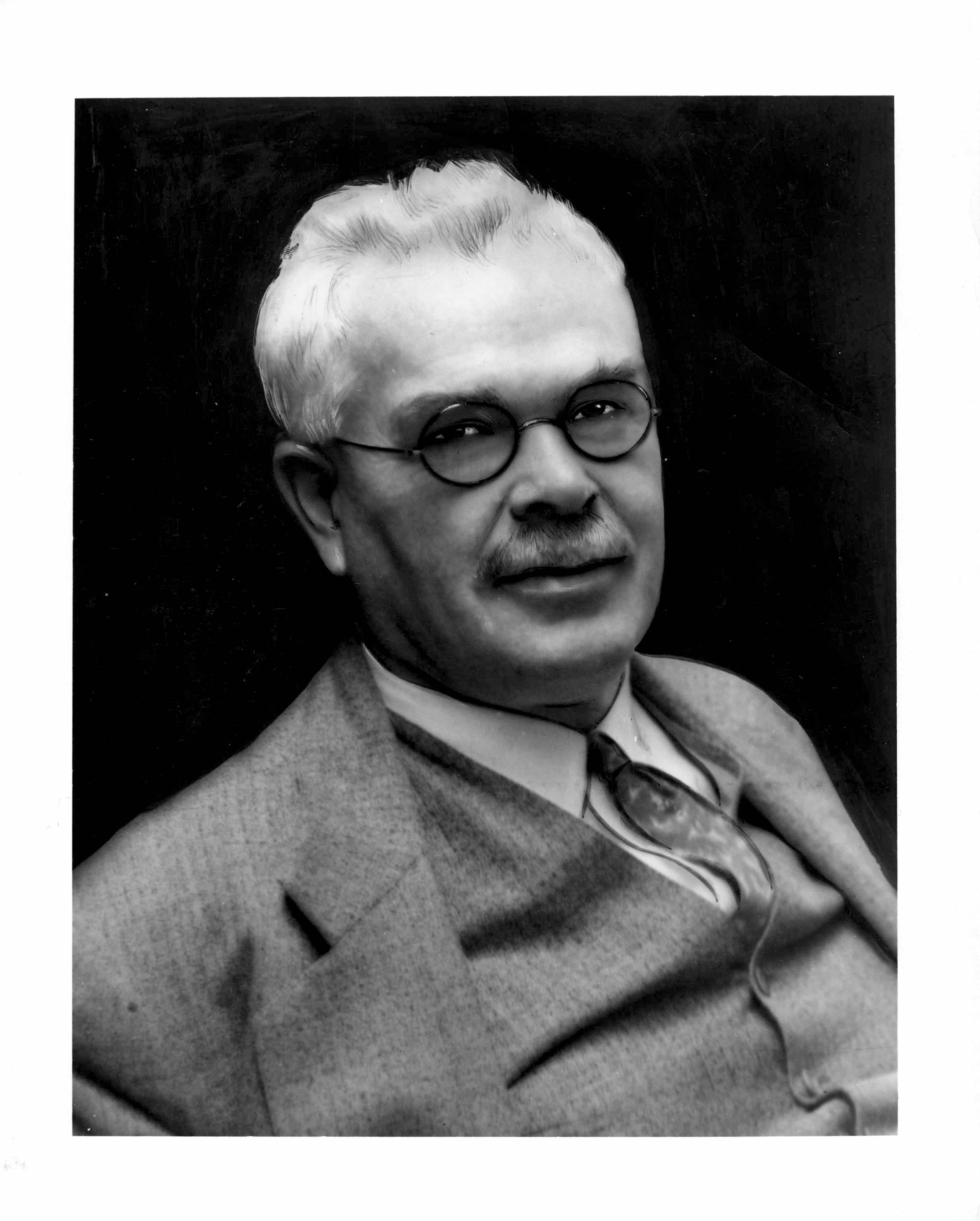 Ritratto di Francis Gladhelm Pease, 190ca.